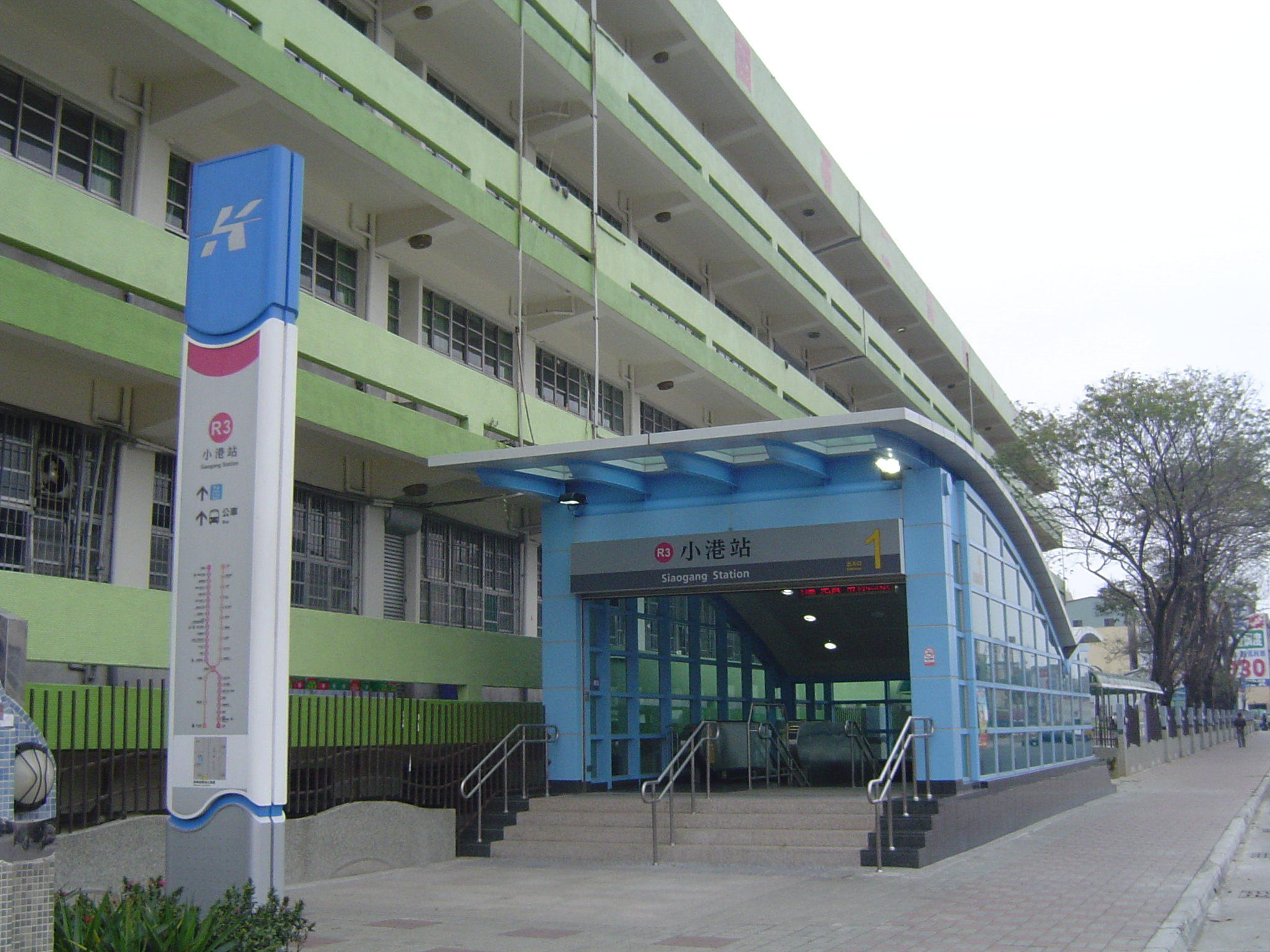 高雄捷運紅線小港站一號出口。